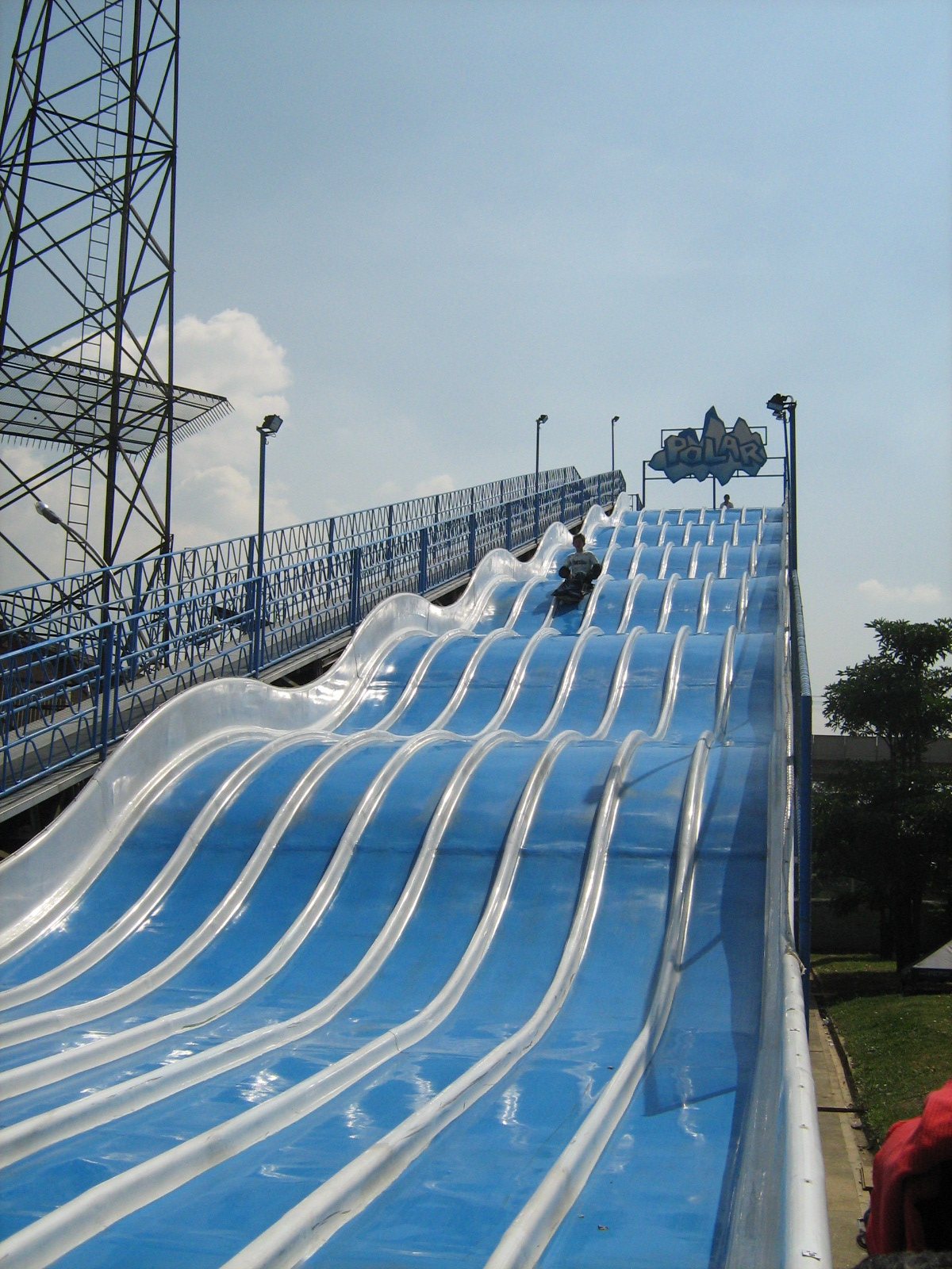 Parque Norte (atracciones mecánicas), Medellín, Colombia